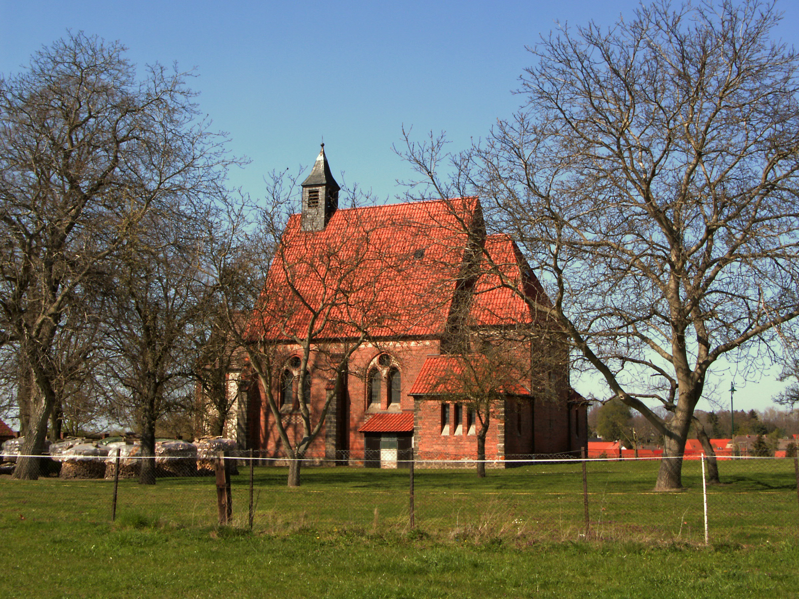 Katholische Kirche St. Josef in Harbke, Landkreis Börde